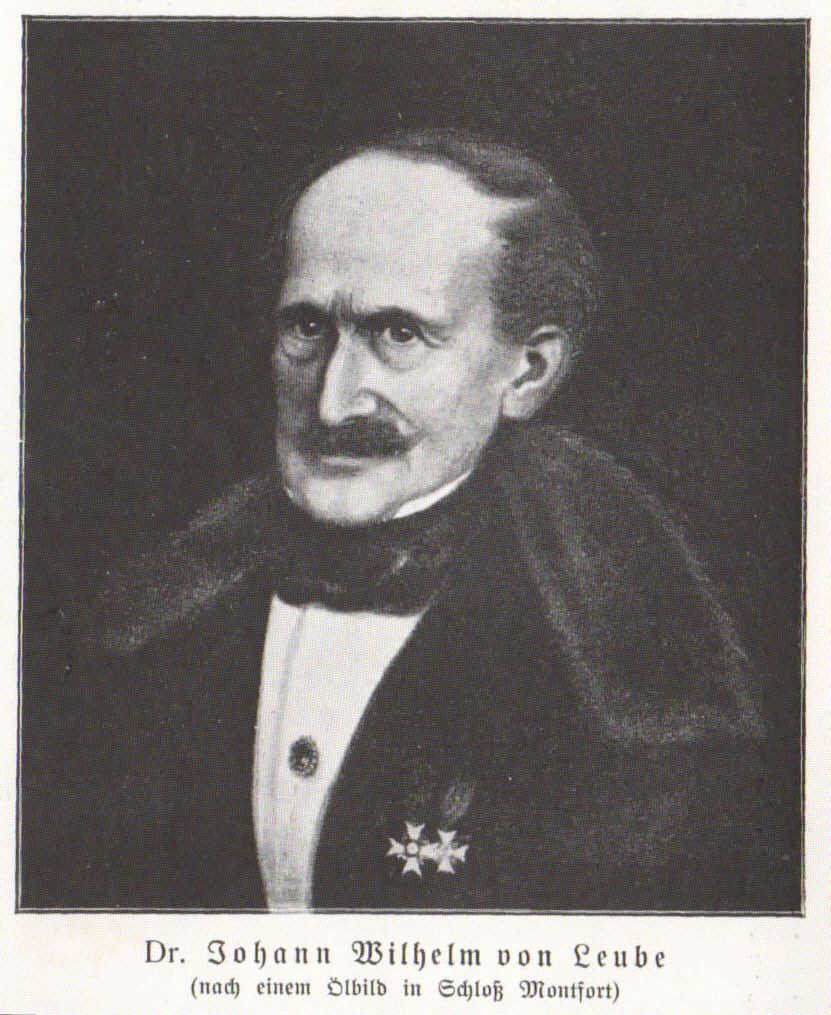 aus: Hans Gies: Die württembergischen Leube. 1927, S. 34. nach einem Ölbild in Schloss Montfort